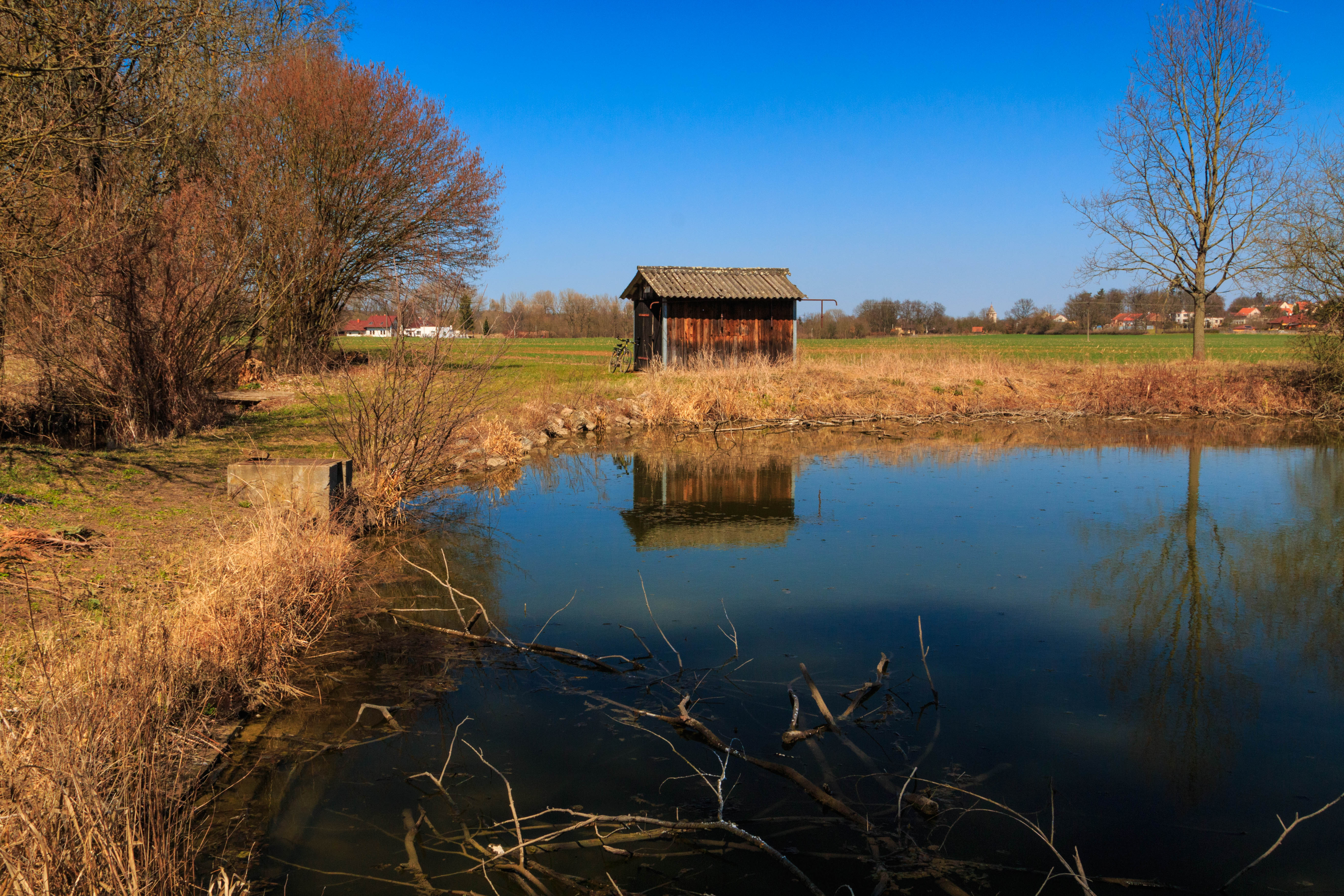 Andrlův rybník u Nechanic Project: Vodstvo.